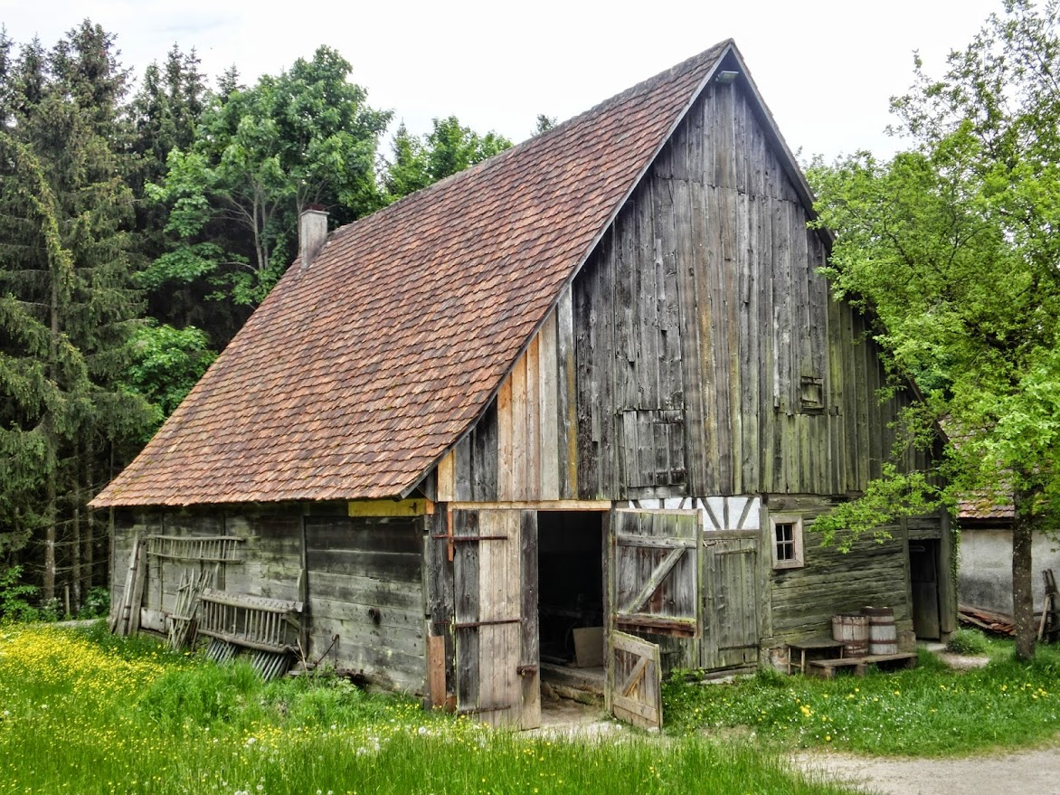 Deutschland - Baden-Württemberg - Landkreis Tuttlingen - Neuhausen ob Eck: Freilichtmuseum - Schaf- und Farrenstall